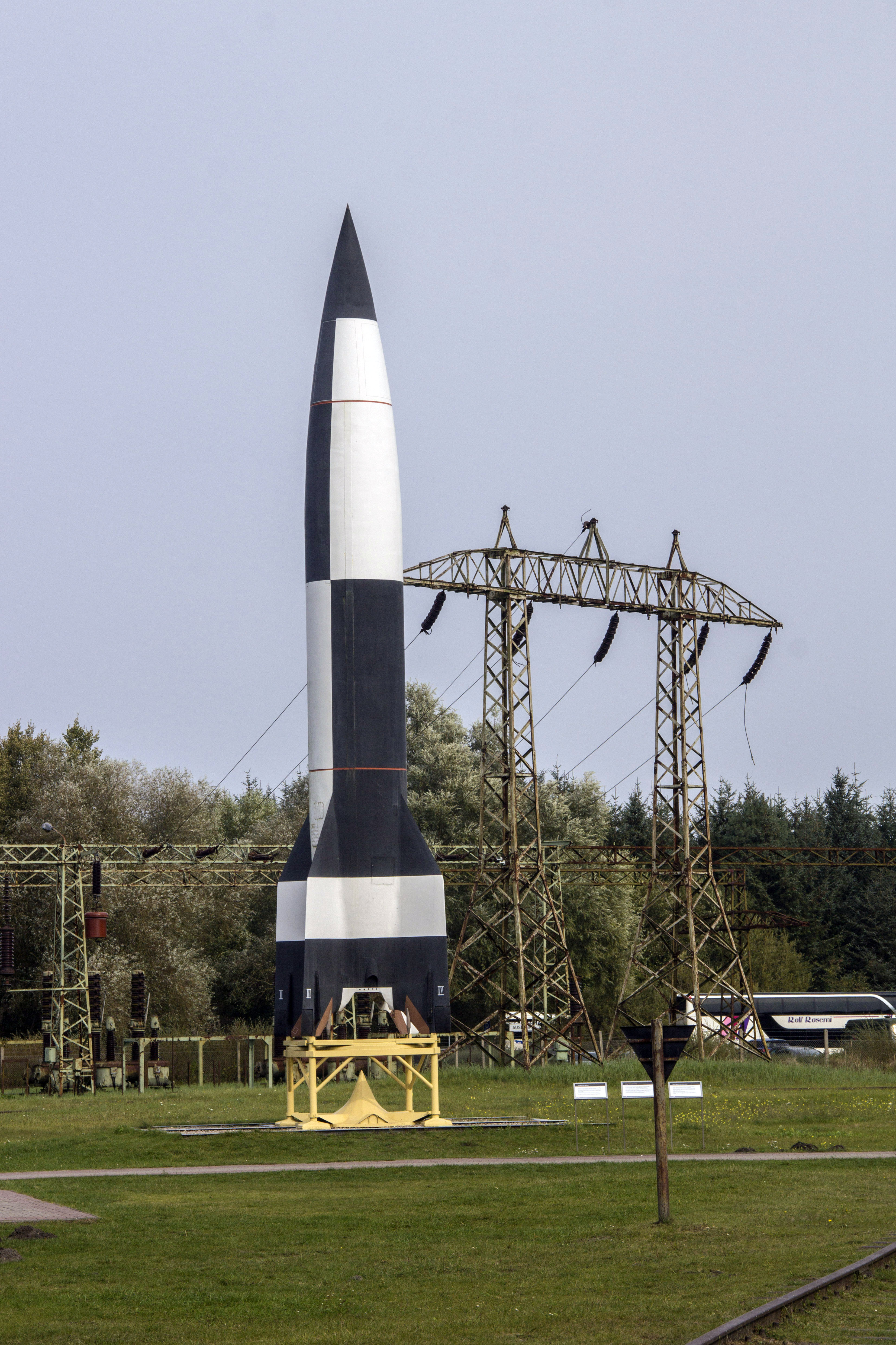 Peenemünde, Museum, V2